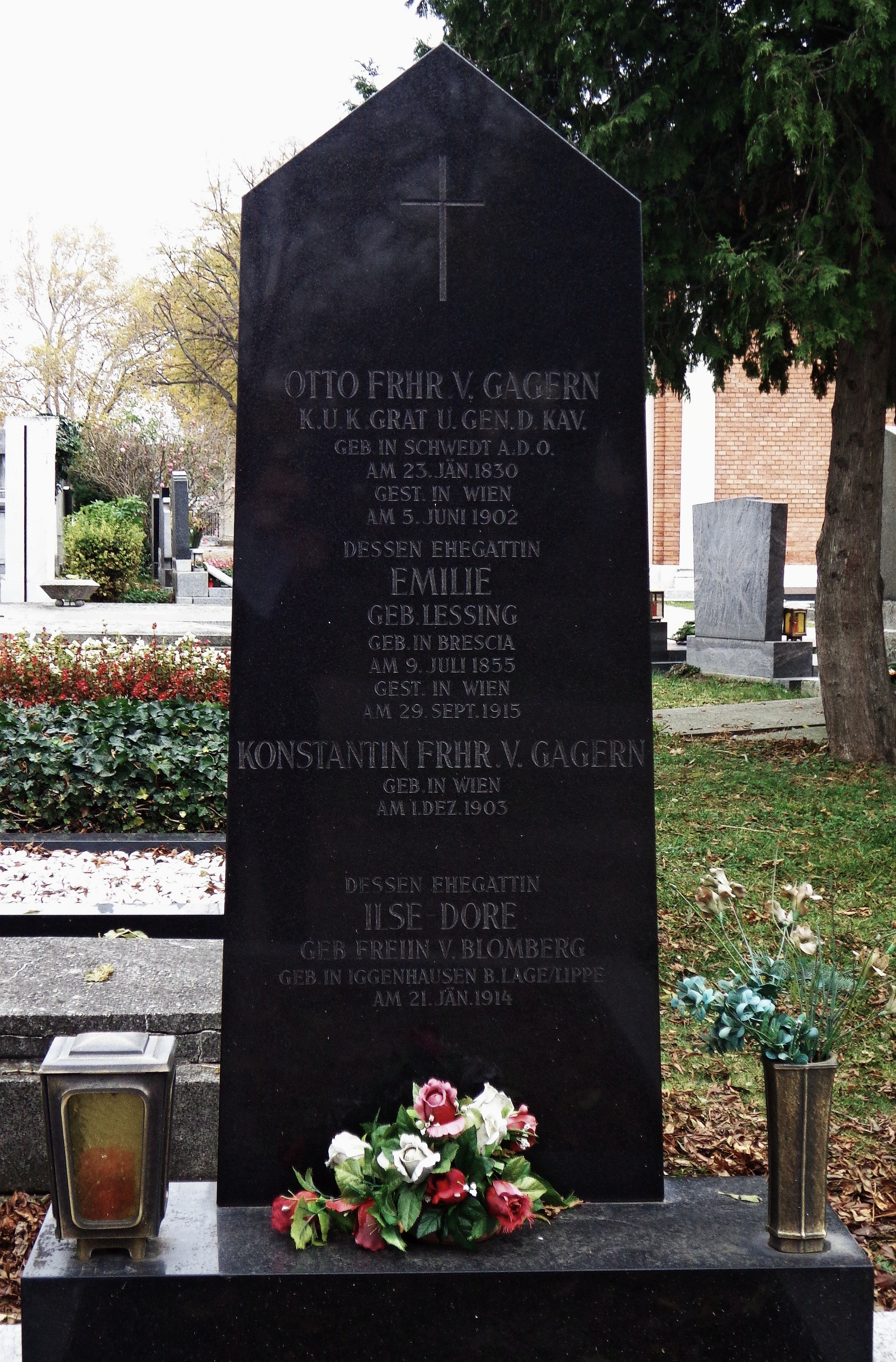 Wiener Zentralfriedhof - Gruppe 12A: Grab von k.u.k. General der Kavallerie Otto Freiherr von Gagern